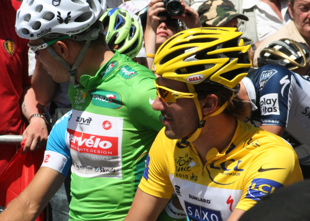 Départ de la 4e étape du Tour de France à Cambrai - Thor Hushovd, Fabian Cancellara